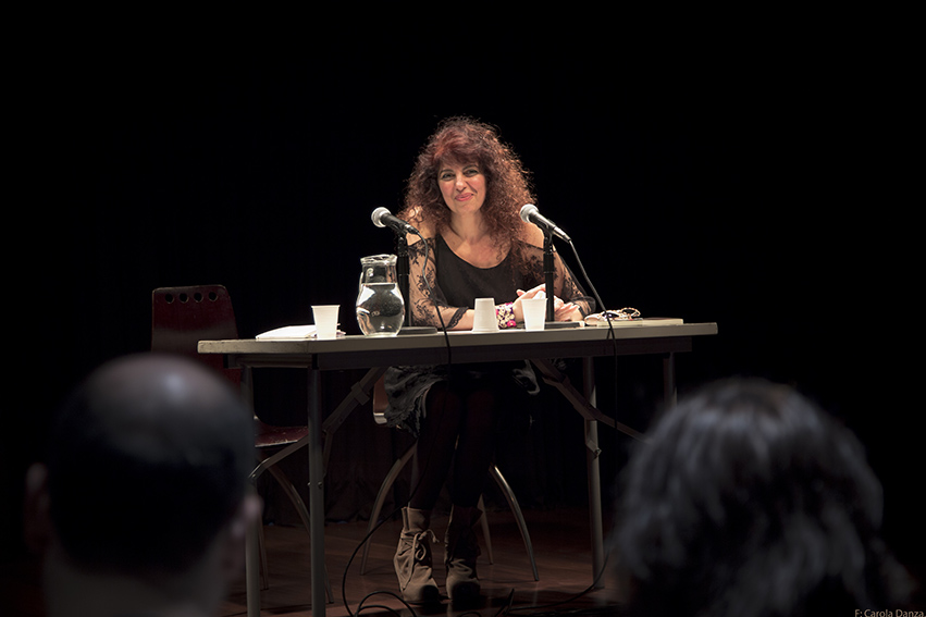 Ana Arzoumanian Dain en el Centro Cultural de la Cooperación de la Ciudad Autónoma de Buenos Aires. En "Lecturas en el Centro" como poeta invitada.